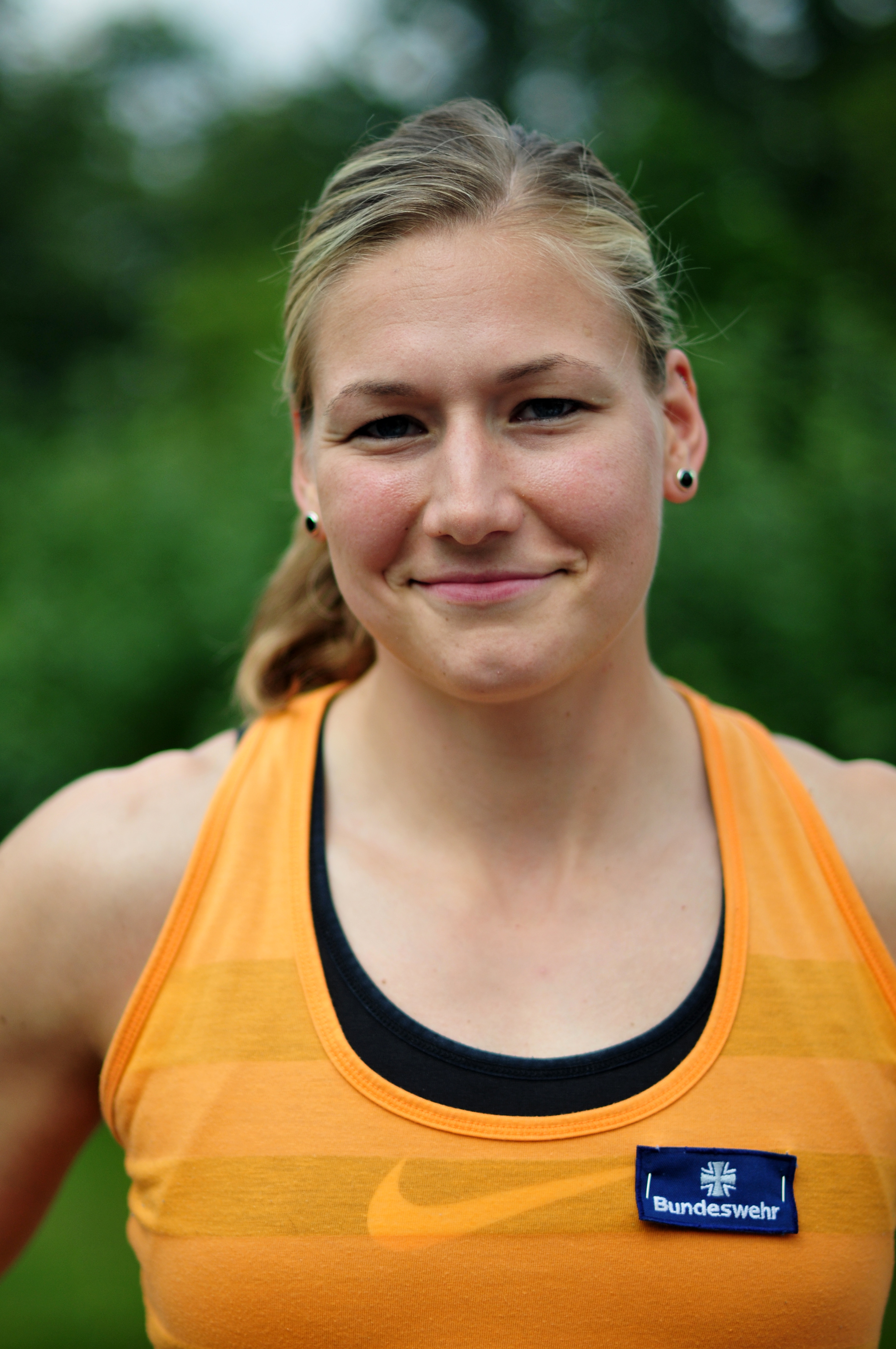 Pressetermin Olympiamannschaft in Kienbaum: Josephine Terlecki